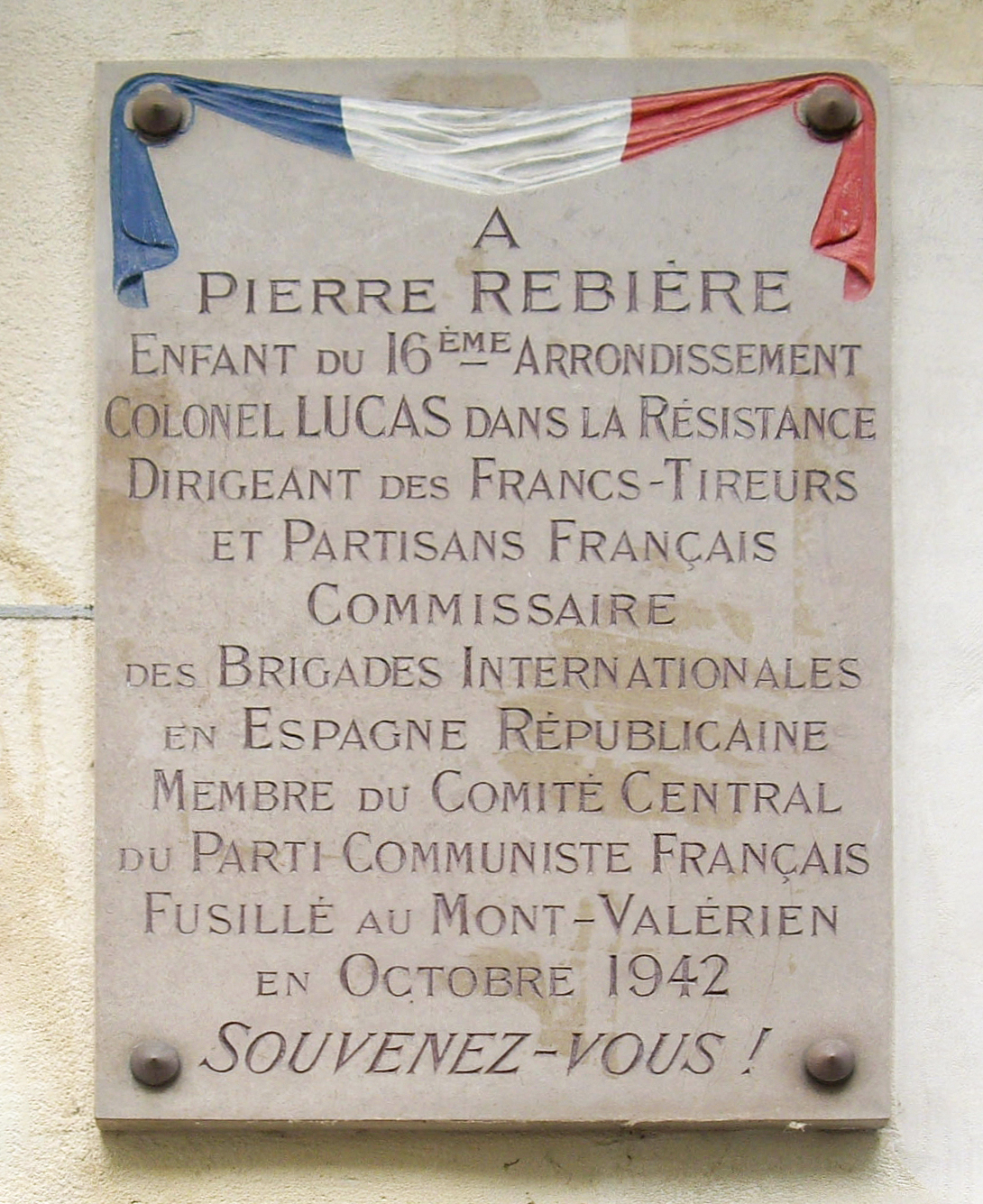 Plaque apposée au n° 69 de la rue Chardon-Lagache, Paris 16e. « À Pierre Rebière, enfant du XVIe arrondissement, colonel Lucas dans la Résistance, dirigeant des Francs-tireurs et partisans-français, commissaire des Brigades internationales en Espagne républicaine, membre du comité central du Parti communiste français, fusillé au Mont Valérien en octobre 1942. Souvenez-vous ! »